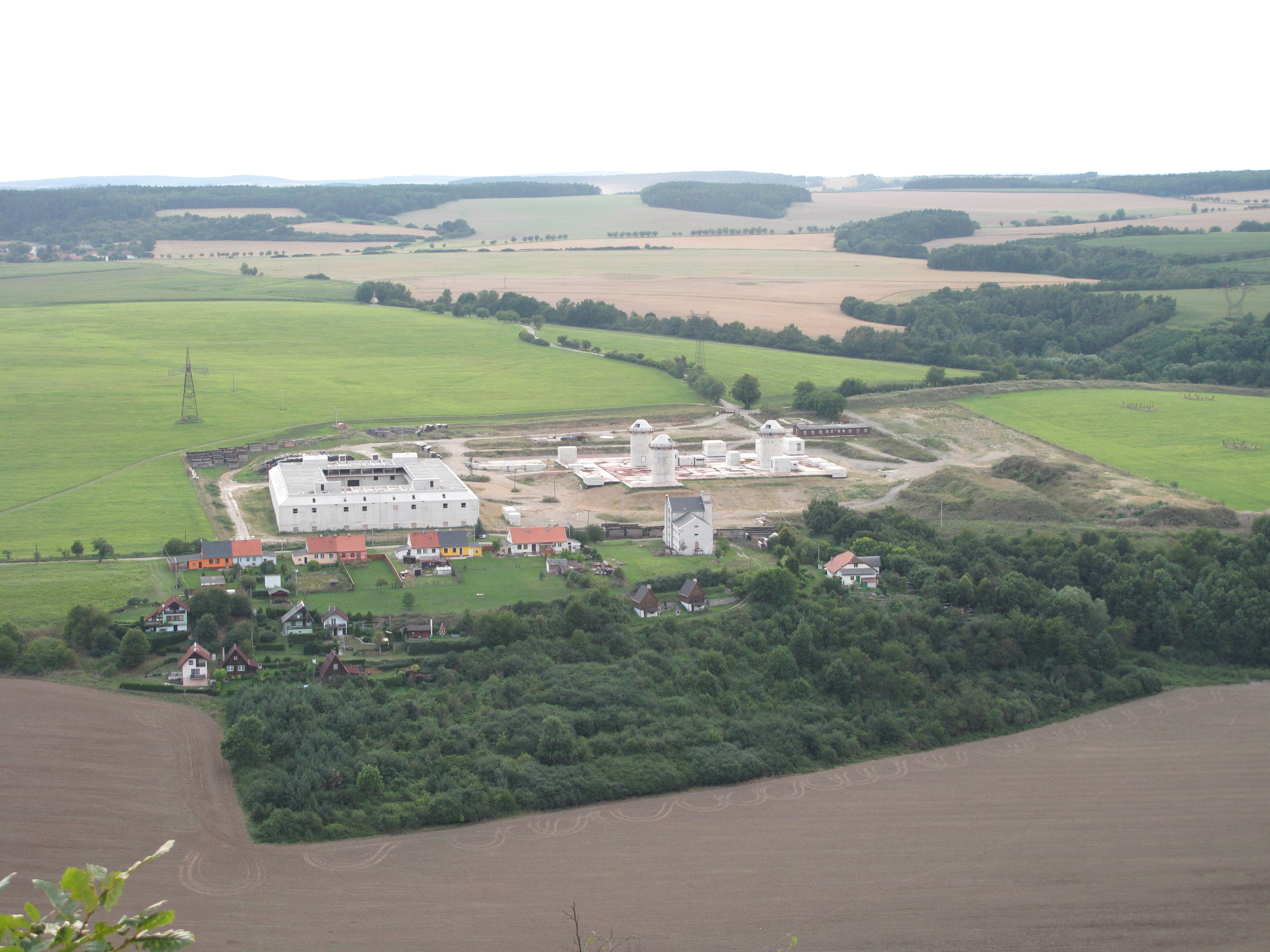 Celkový pohled na hospodářský dvůr Ptyč. Okres Rokycany, Česká republika.